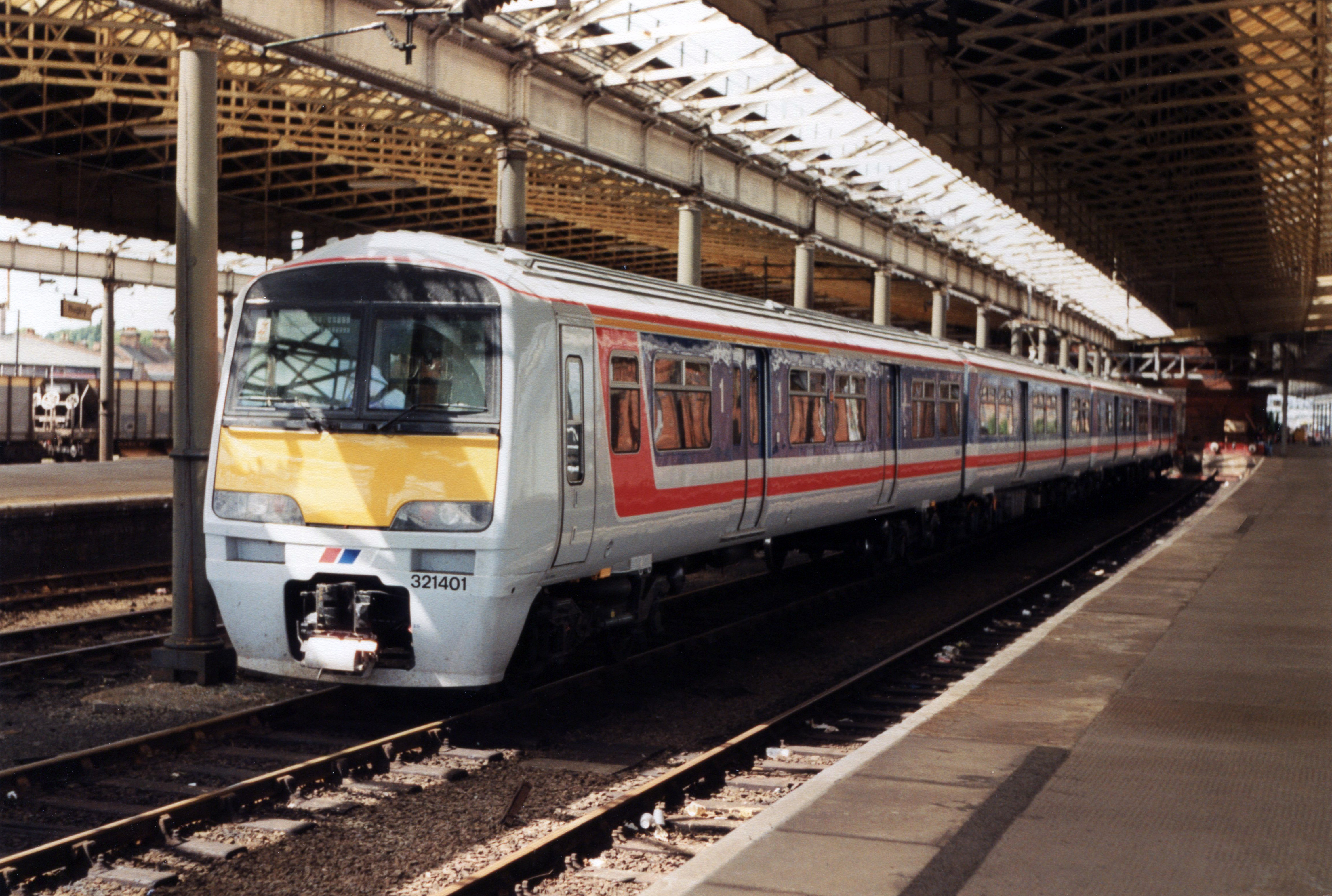 321401 - Rugby